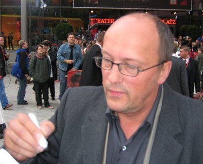 Hans Werner Olm als Gast bei der Deutschlandpremiere von Star Wars Episode III im Mai 2005 in Berlin.